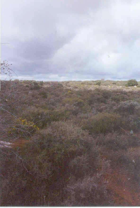 Vista de un aliagar, con el encinar al fondo. Foto Propia.